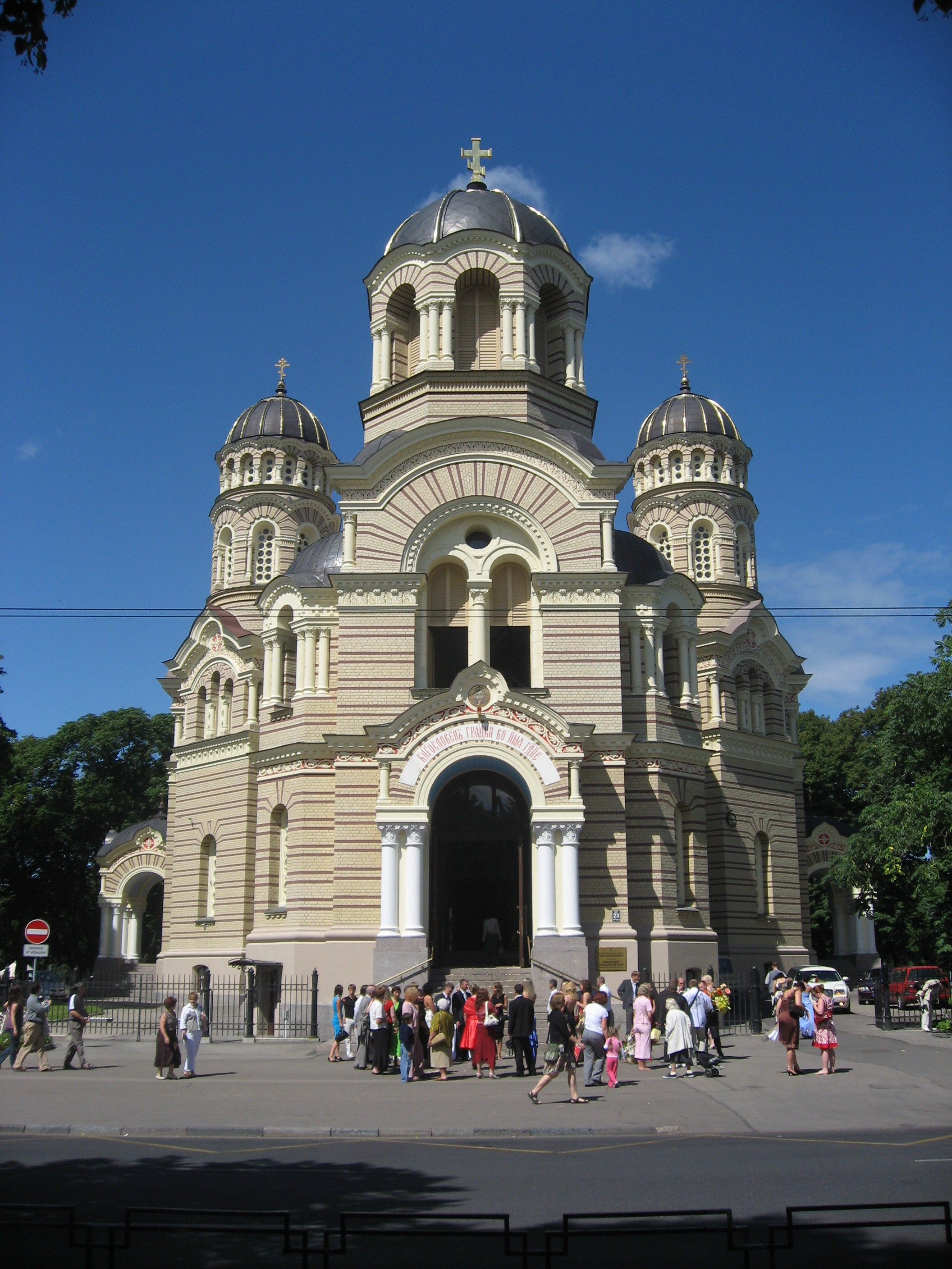 Pareizticīgo Kristus dzimšanas Rīgas katedrāle